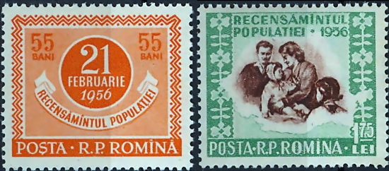 Recensamantul din 1956